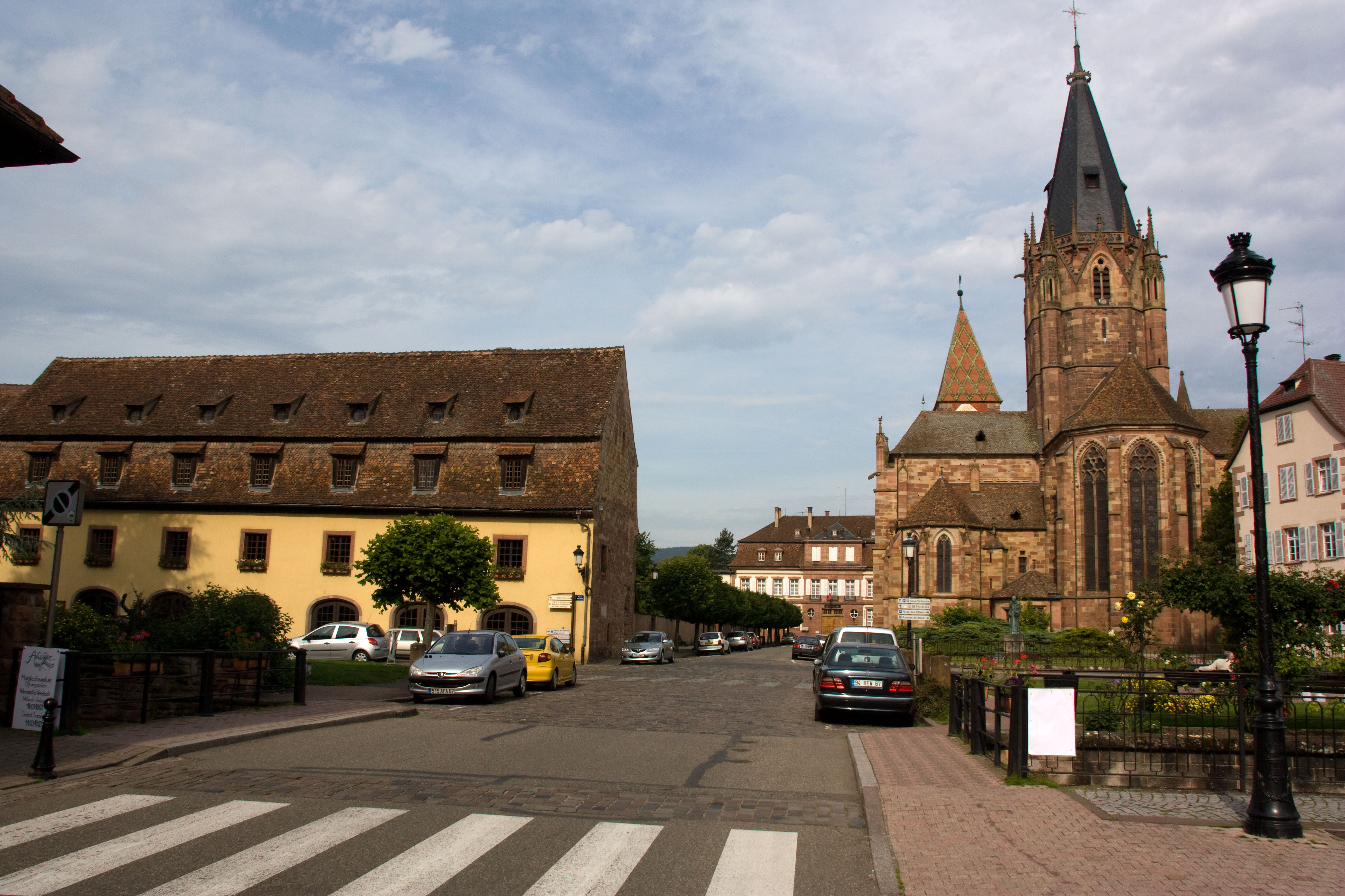 V ue de Wissembourg (Eglise Saints-Pierre-et-Paul), Wissembourg, Alsace, France